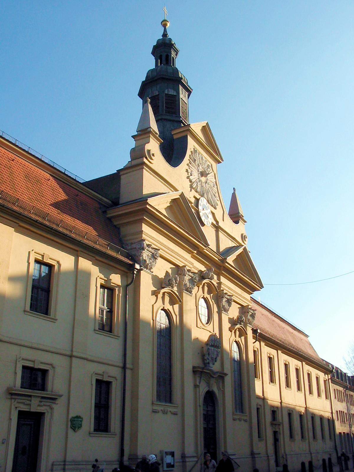 Die heutige barocke Heilig-Geist-Kirche in Fulda wurde in den Jahren 1729 bis 1733 als Hospitalkirche an der Stelle ihrer gotischen Vorgängerin aus dem 13. Jahrhundert erbaut.